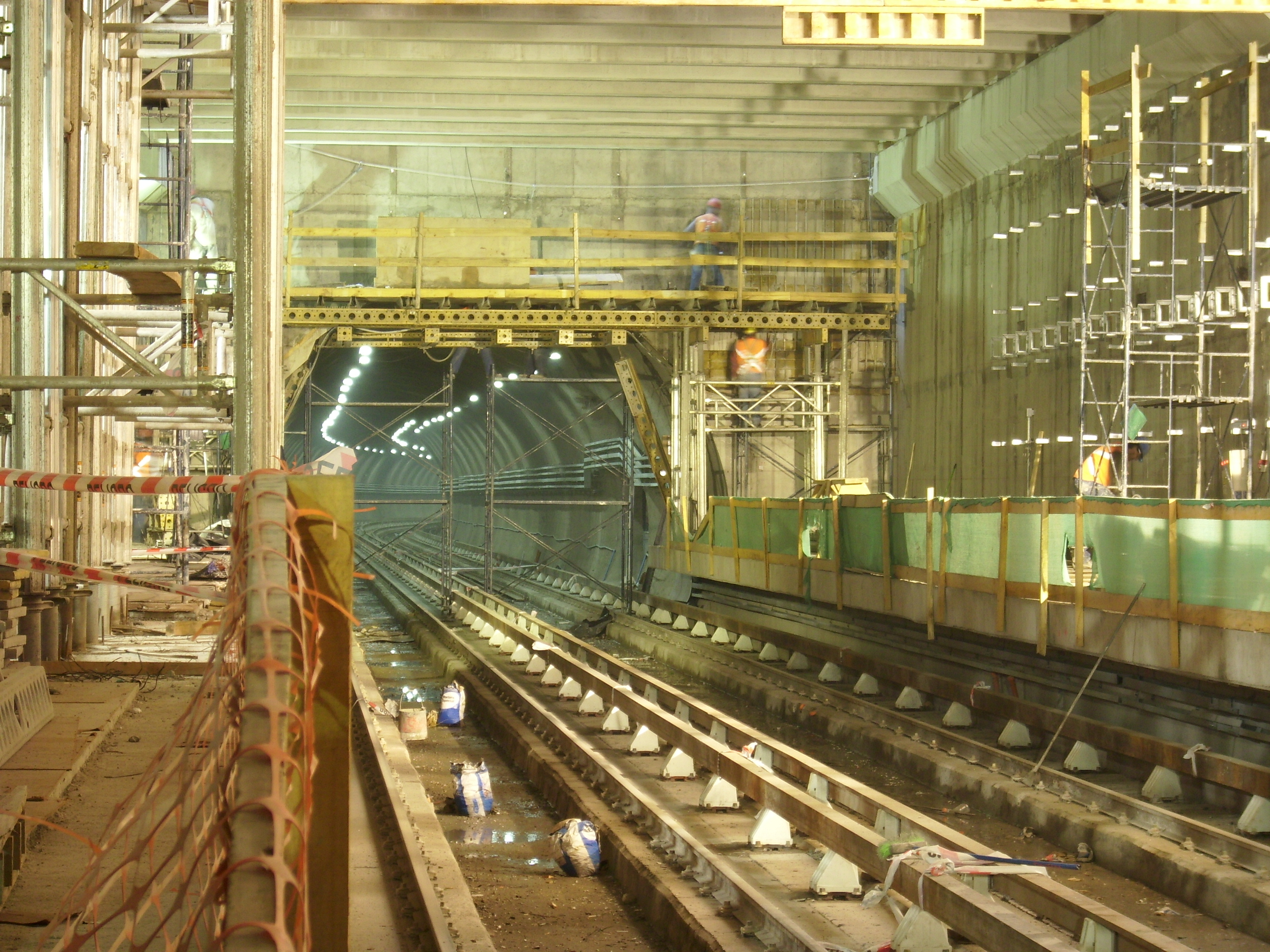 El túnel que conectará la estaciones Del Sol y Monte Tabor, visto desde los andenes de la estación Del Sol, pertenecientes a la Línea 5 del Metro de Santiago. Fotografía tomada durante la visita organizada el día 8 de mayo de 2010. Maipú, Santiago de Chile.